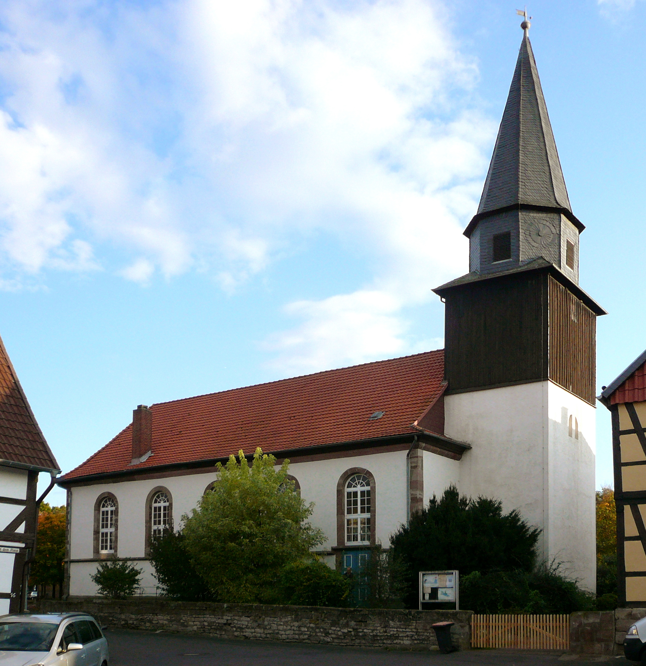 Evangelisch-reformierte Martinikirche in Bovenden, Landkreis Göttingen, Niedersachsen. Turm im Kern mittelalterlich, Umgestaltung 18./19. Jahrhundert. Ansicht von Nordwesten